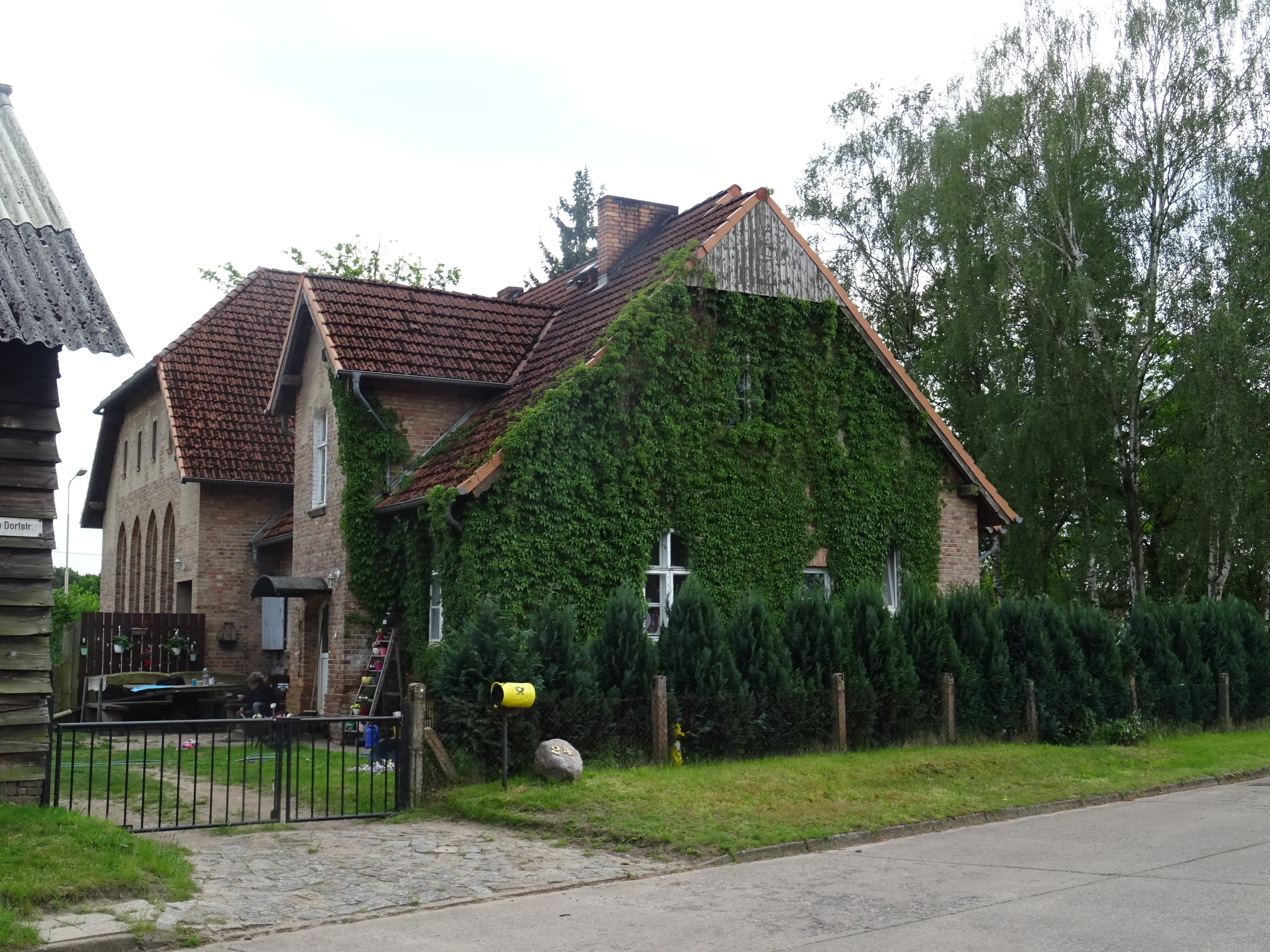 Liepe. Gemeinde Hammer an der Uecker, denkmalgeschützte ehemalige Dorfschule